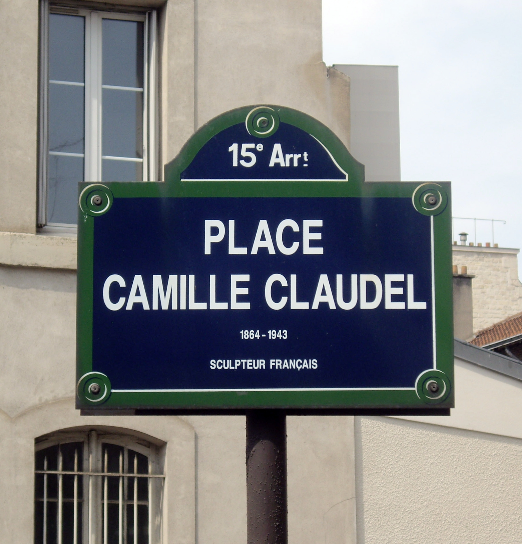 Place Camille-Claudel, Paris 15e. « Camille Claudel, 1864-1943, sculpteur français. »